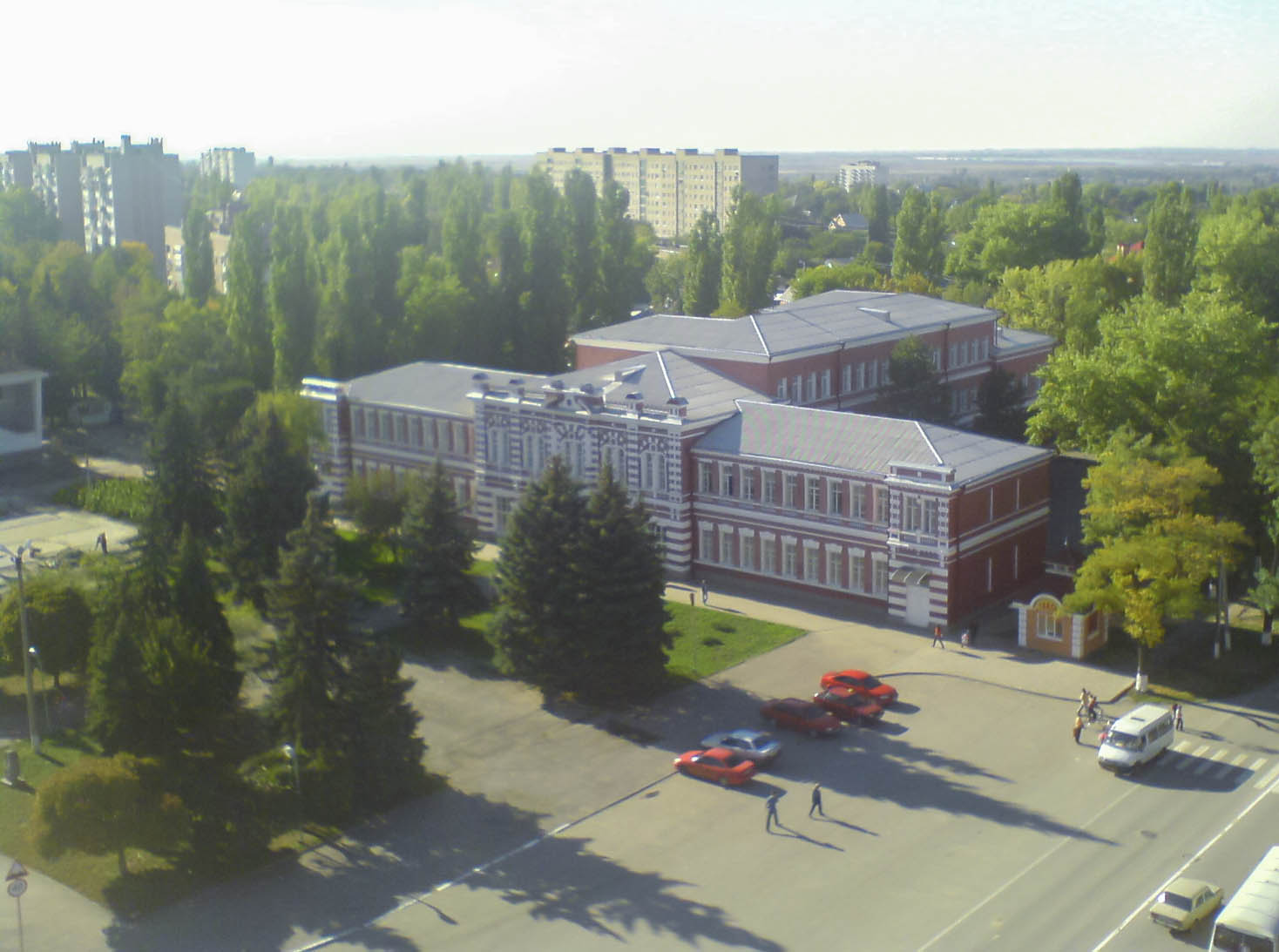 Здание мужской прогимназии (Ростовская область, Азов)